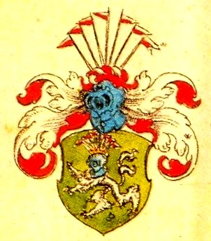 Wappen derer von Bültzingslöwen (früher auch Bültzingsleben; Thüringer Uradel)